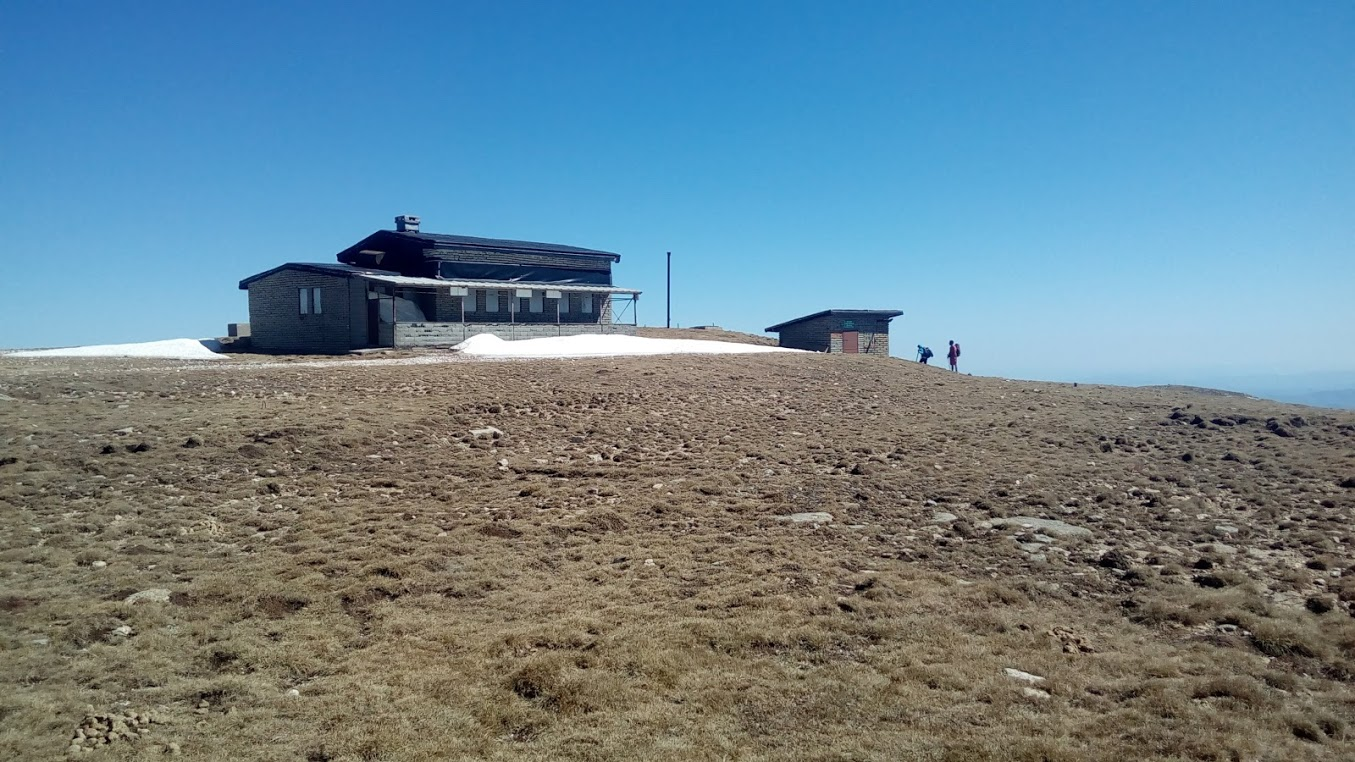 Golyam Kademliya Peak